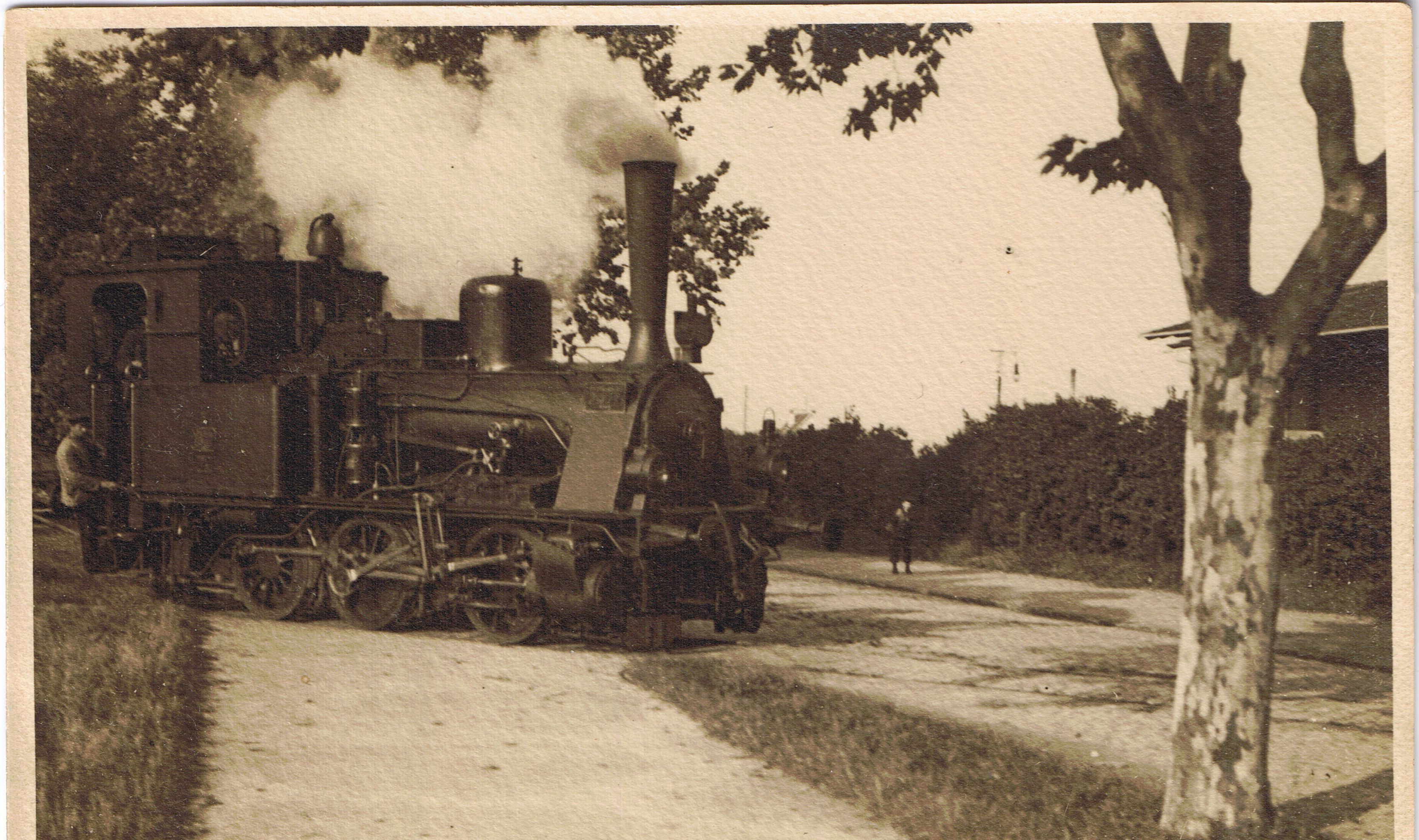 Eine preussische T3 Dampflok bei der Ausfahrt aus dem Pfungstädter Brauereigelände.